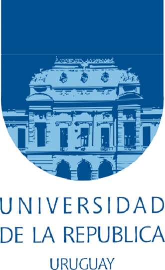 Logo de la Universidad de la República